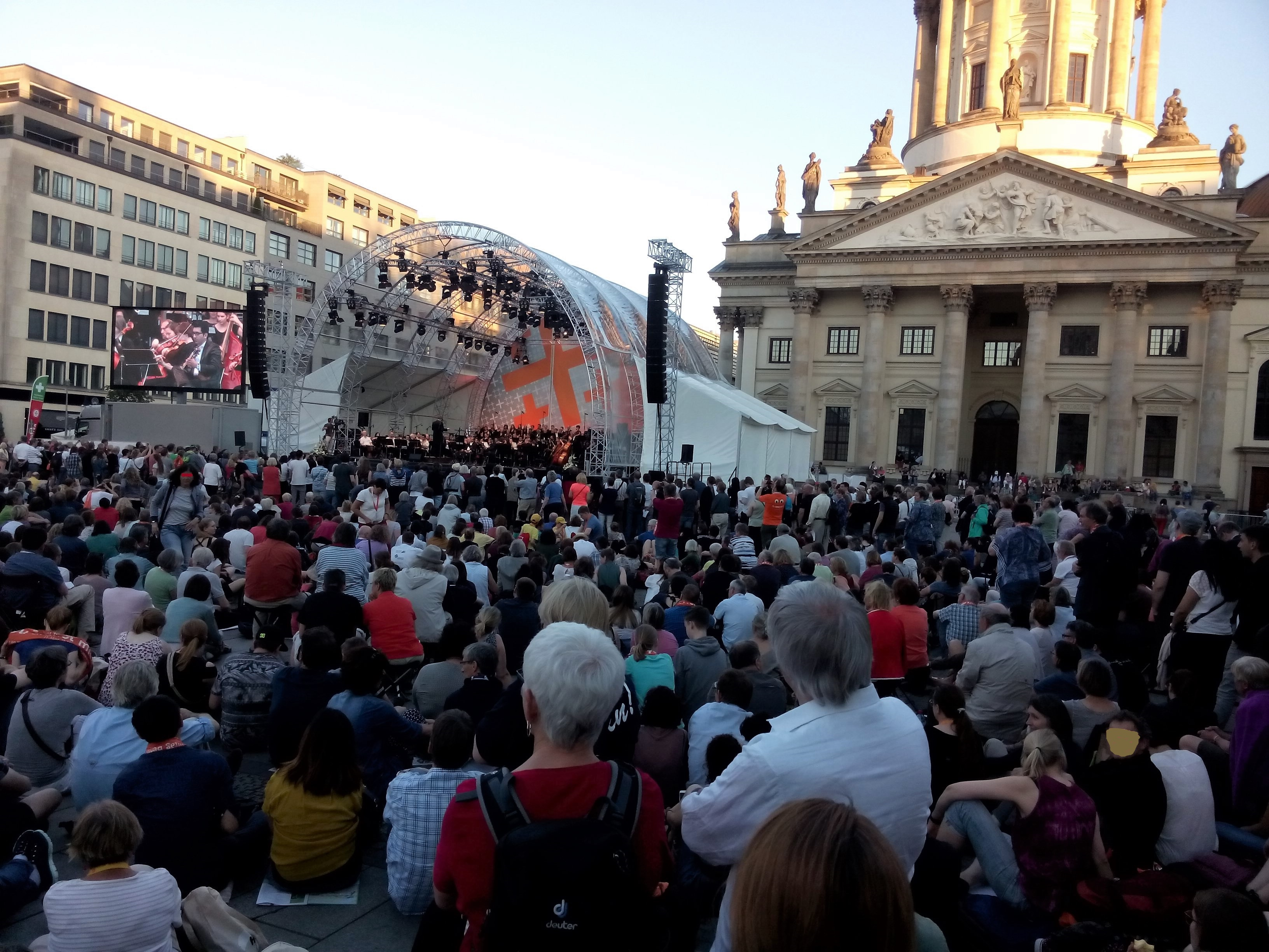 Dt. Evang. Kirchentag Berlin 2017 Solidaritätskonzert am 27.5.17 - Musik kennt keine Grenzen Mit den Berliner Symphonikern und Geflüchteten - Bühne auf dem Gendarmenmarkt